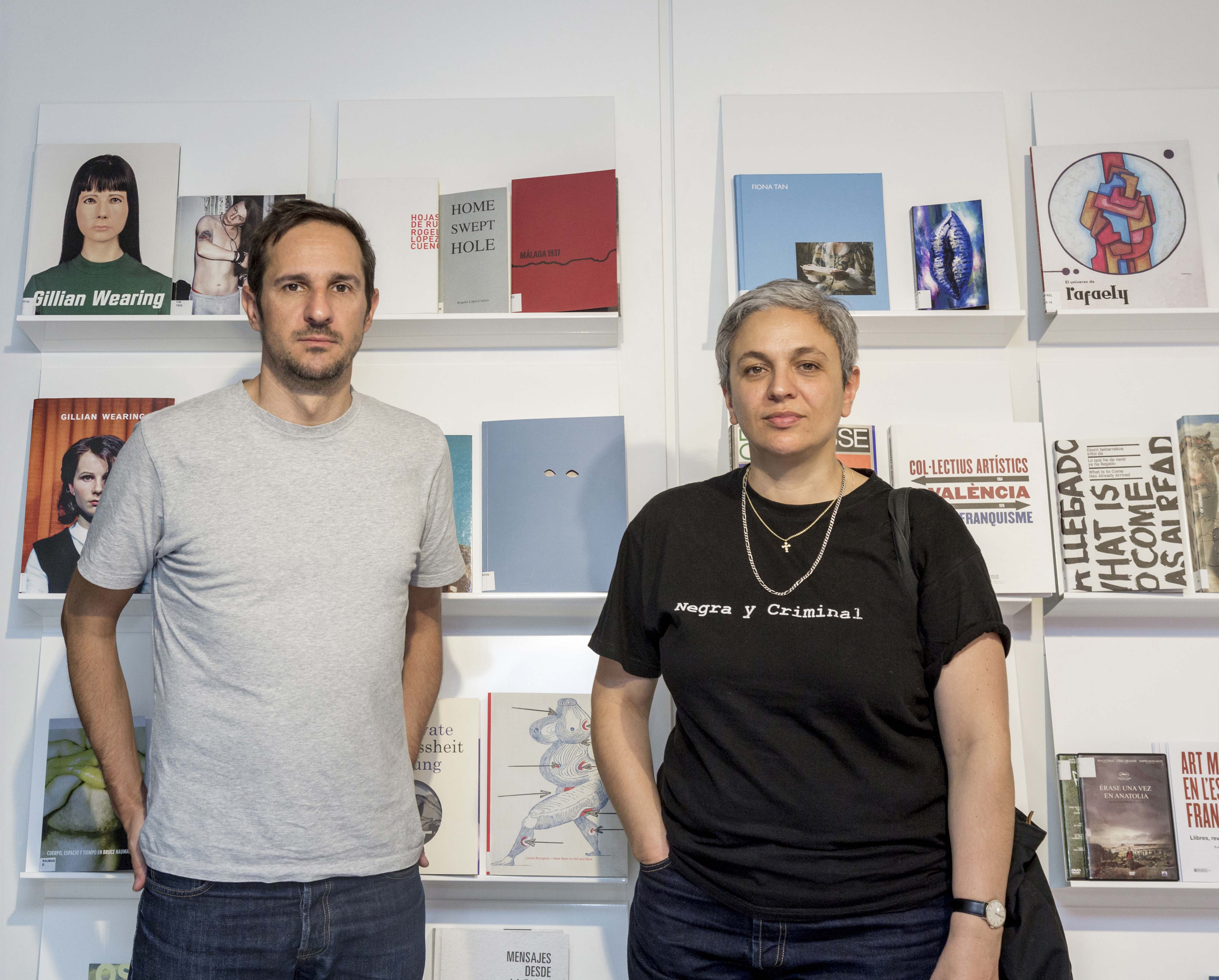 Peio Aguirre con Dora García en el IVAM Valencia con motivo de su colaboración "Respiración artificial" 2016